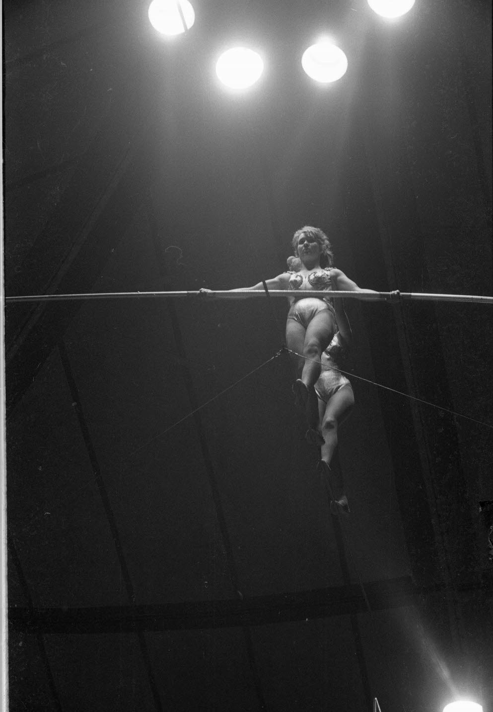 Rudolfo-Stey-Truppe beim Seiltanz.